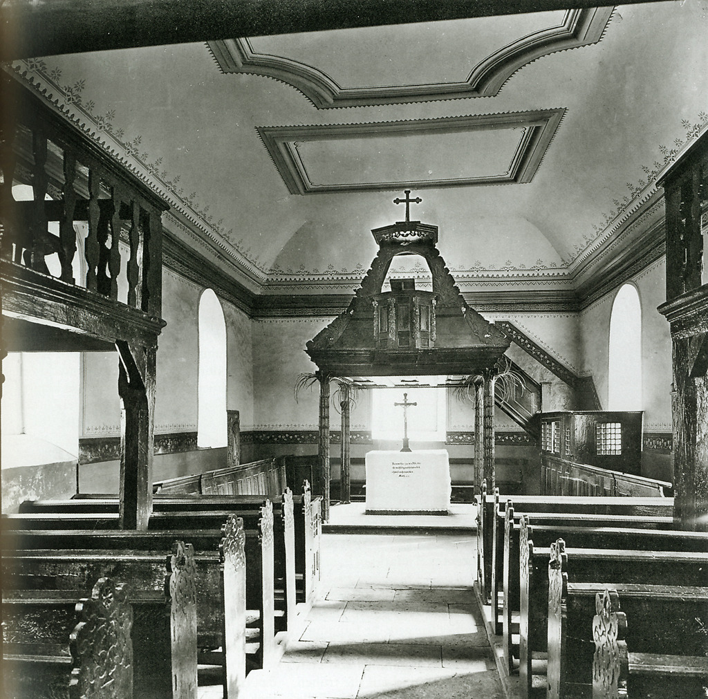 Das Innere der Kirchen in Bringhausen, um 1905.